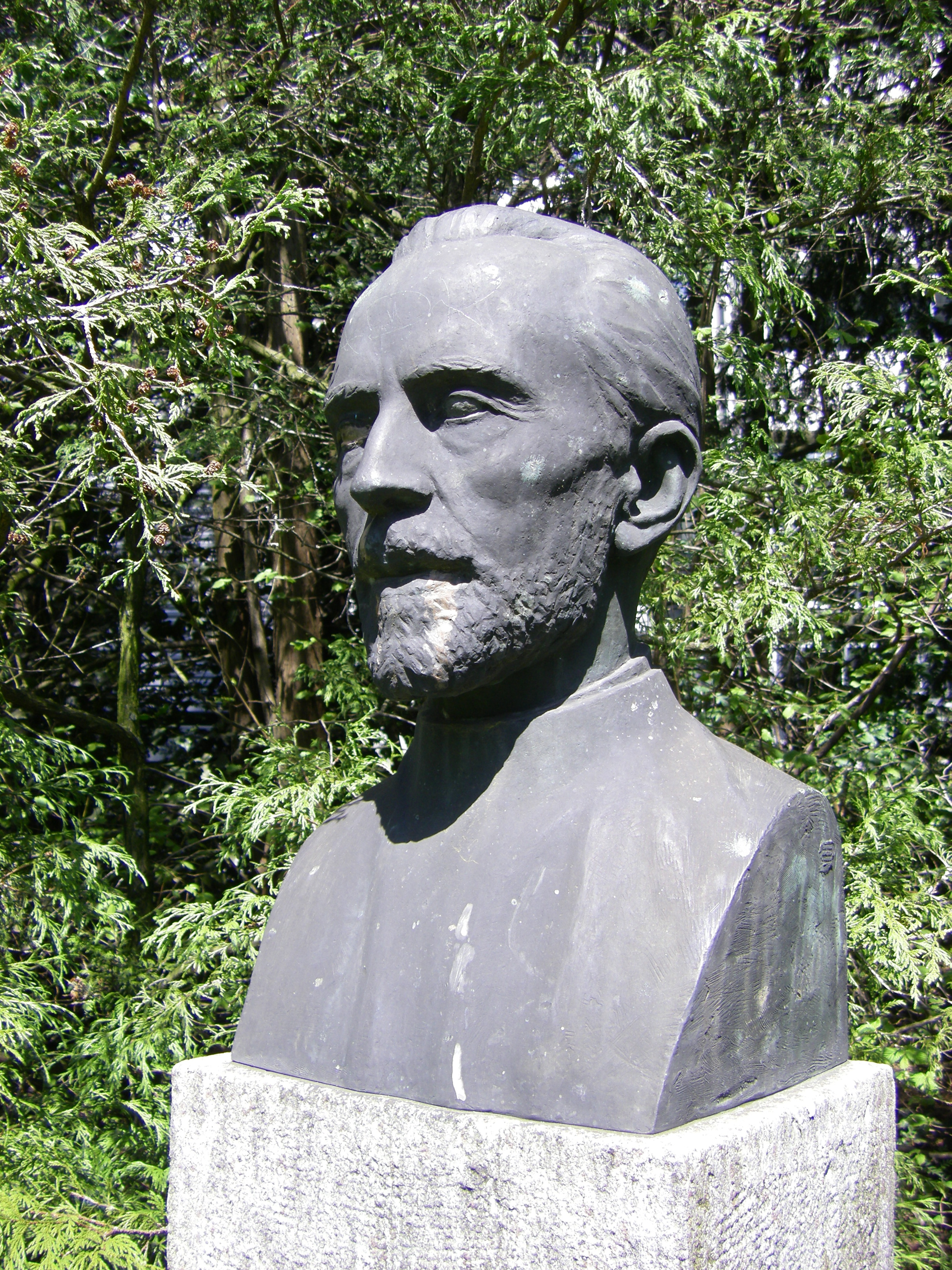 Büste Theodor Kochers im Kocherpark, Bern, Schweiz. Bildhauer: Max Fueter (1898-1983). Büste von 1944.